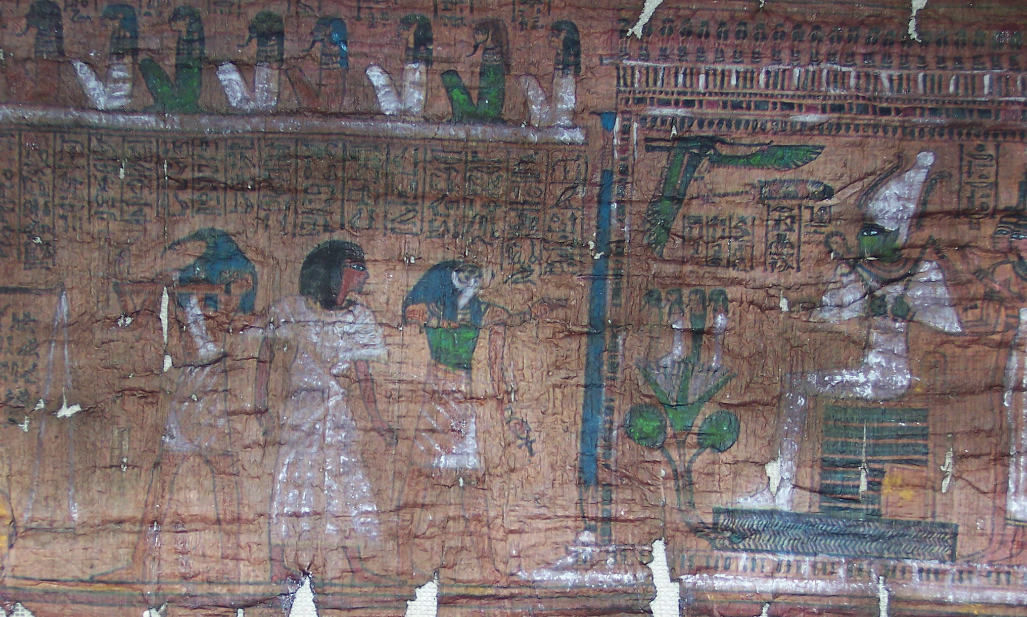 Fragmento del capítulo 125 del Libro de los Muertos (reproducción), donde se ve (de izquierda a derecha) a Thot, el difunto, Horus, Osiris, Isis y Neftis (encimadas).